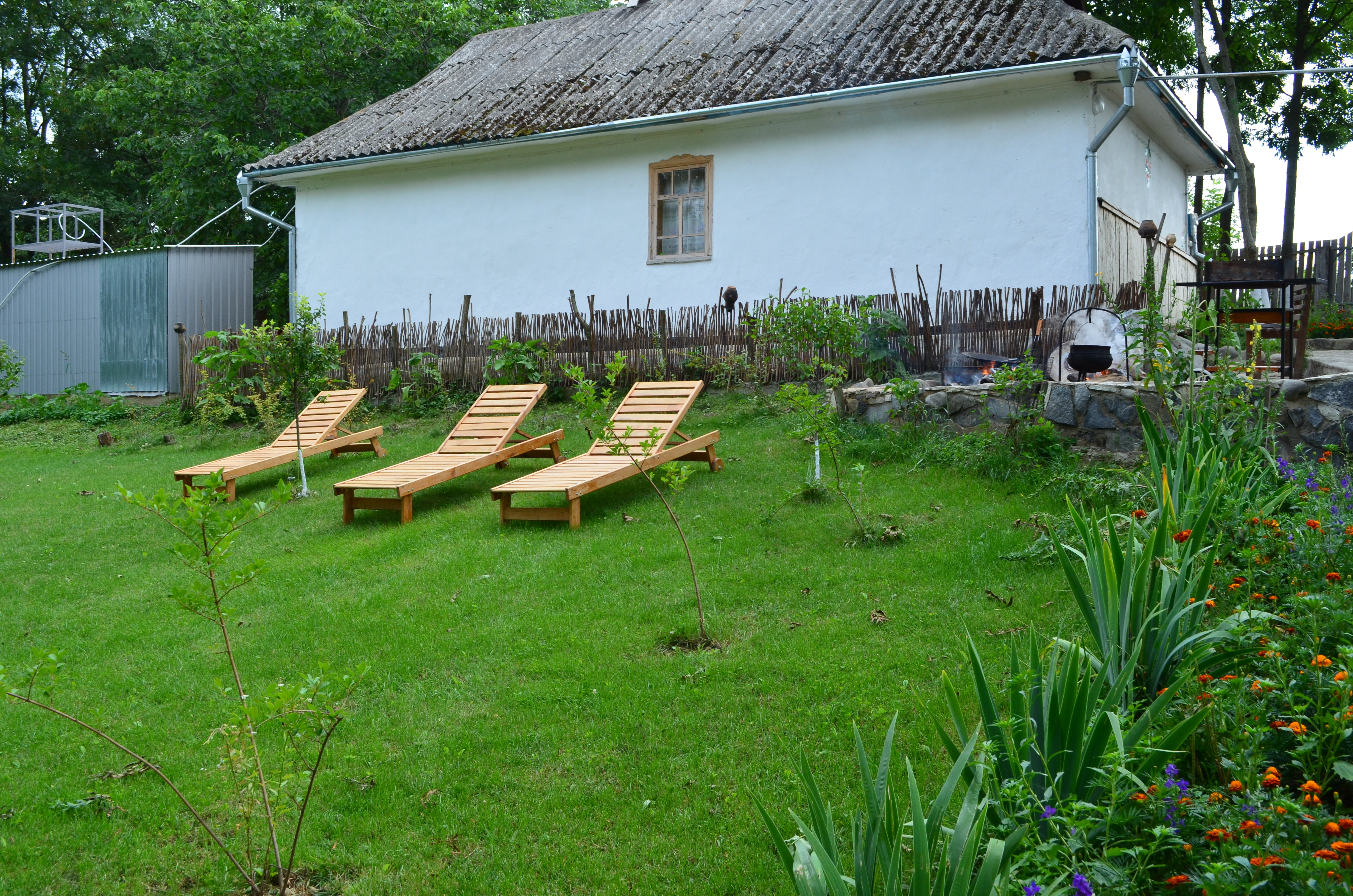 Садиба екологічного туризму "Родинне гніздо"